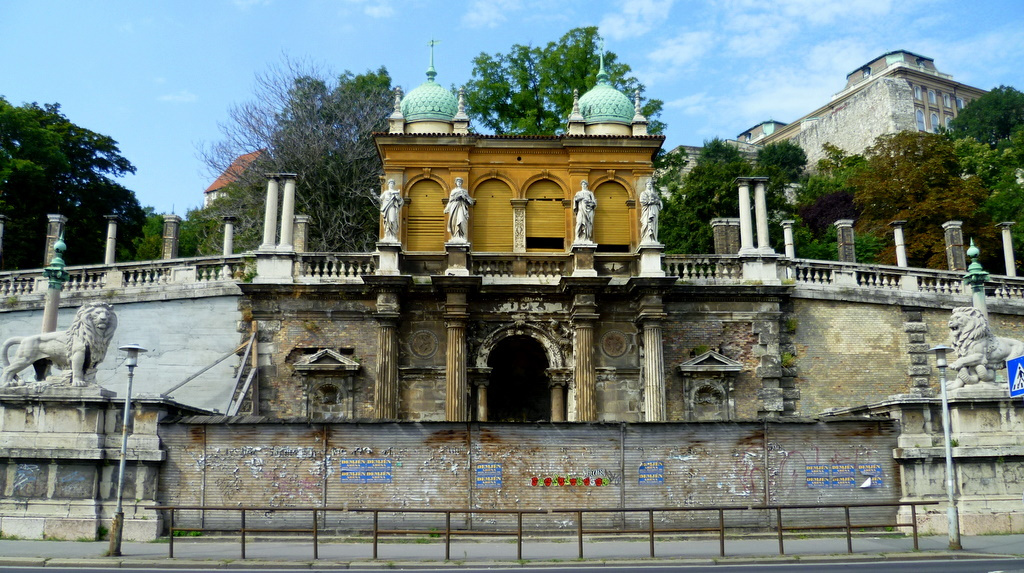 Várkert bazár (Budapest 1, Ybl Miklós tér 2-6.) This is a photo of a monument in Hungary, Identifier: 18147